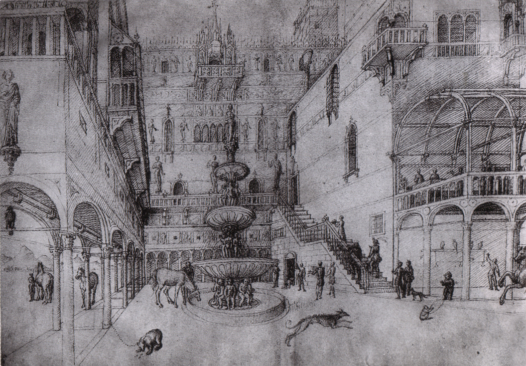 BELLINI, Jacopo Leadpoint on parchment, 426 x 286 mm Musée du Louvre, Paris